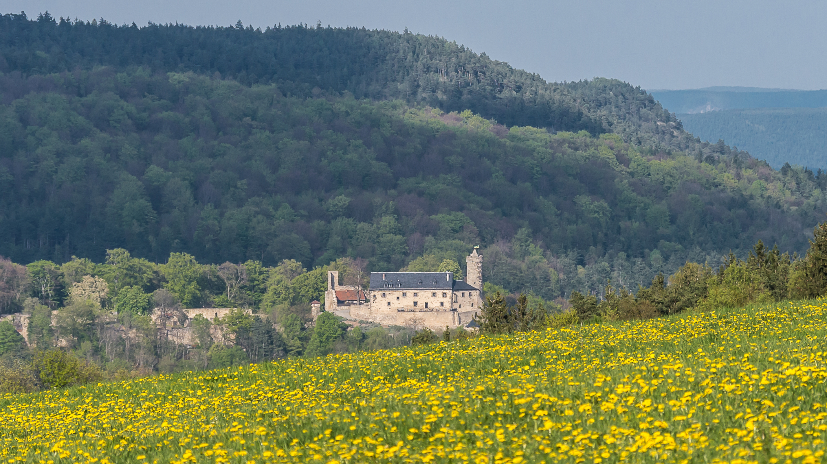 Naturschutzgebiet „Greifenstein“ (NSG Nr. 158) in Thüringen mit Burg Greifenstein, Bad Blankenburg; die Lage der Burg aus südwestlicher Richtung gesehen